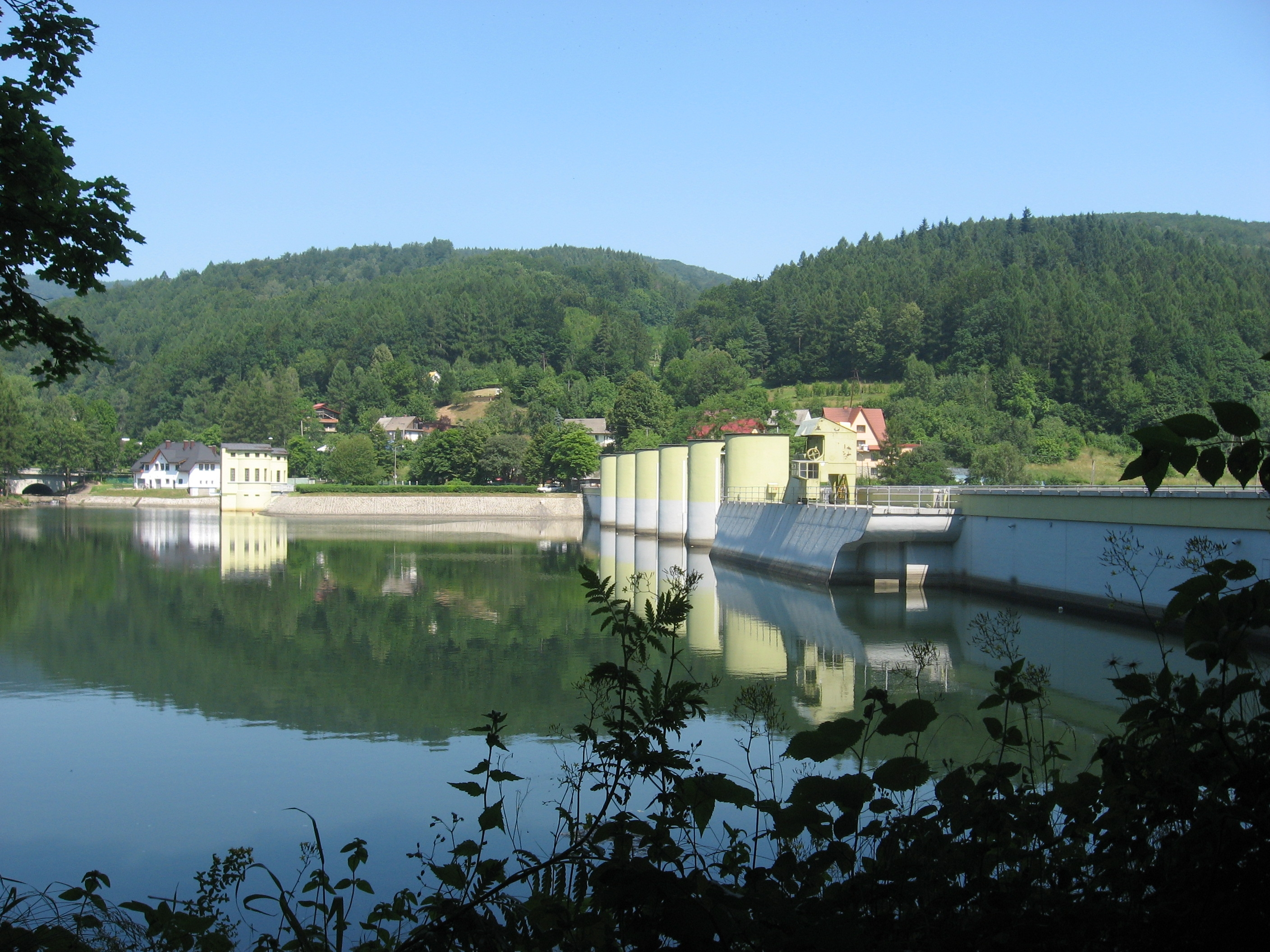 Zdjęcie przedstawiające zaporę wodną Porąbka